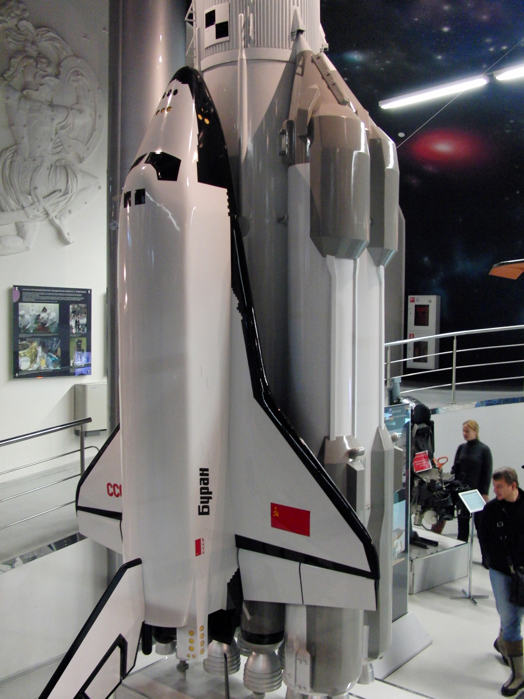 Buran spaceship, model (Буран, модель)